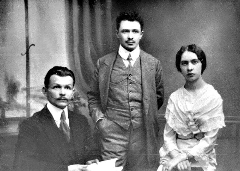 Гальяш Леўчык, Зоська Верас, Рамуальд Зямкевіч